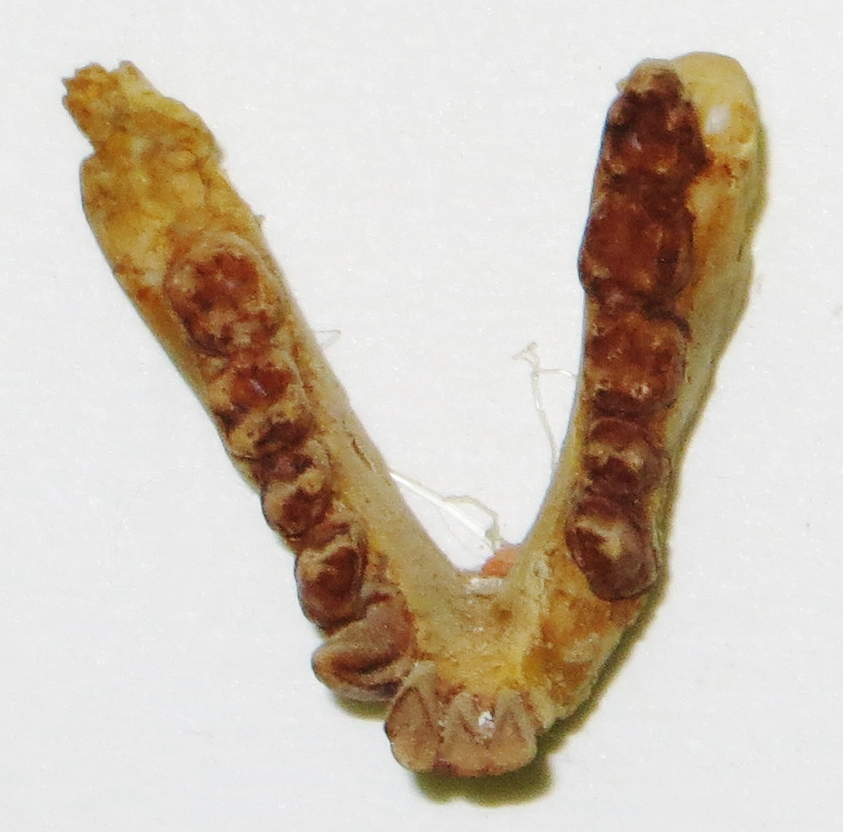 Fossil of Propliopithecus- Took the picture at Museo di Storia Naturale, Milano